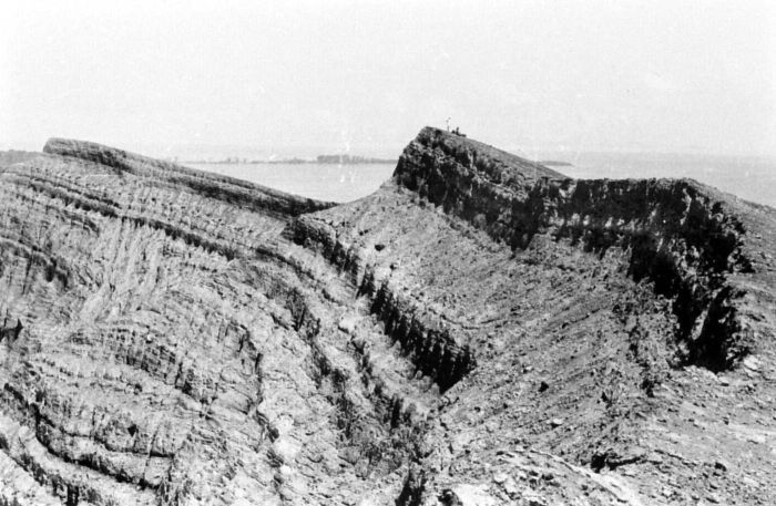 Repronegatief. Op de top van het nieuwe eruptiepunt van de Krakatau-vulkanen